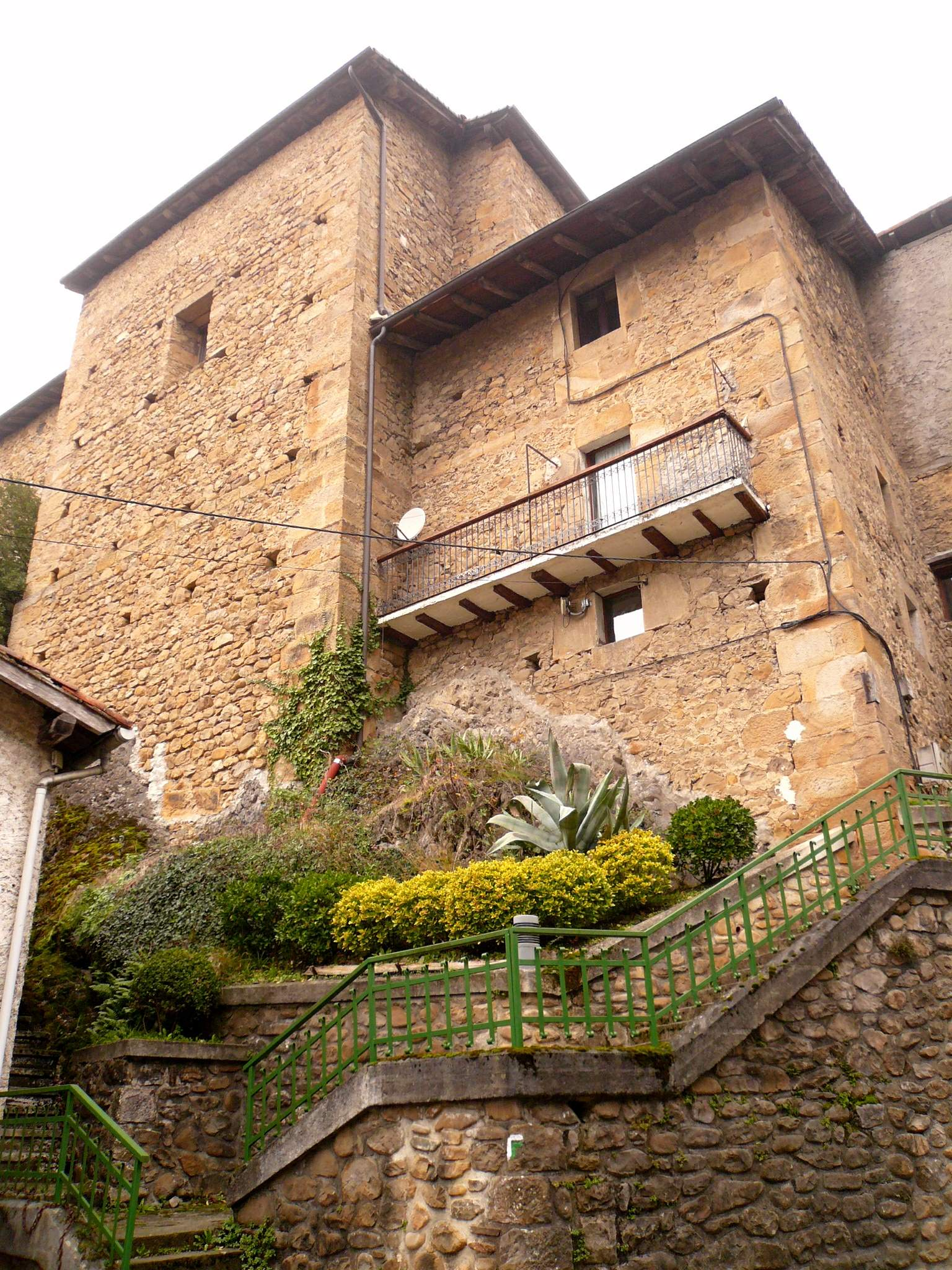 Iglesia de San Gregorio (Ataun, Guipúzcoa)